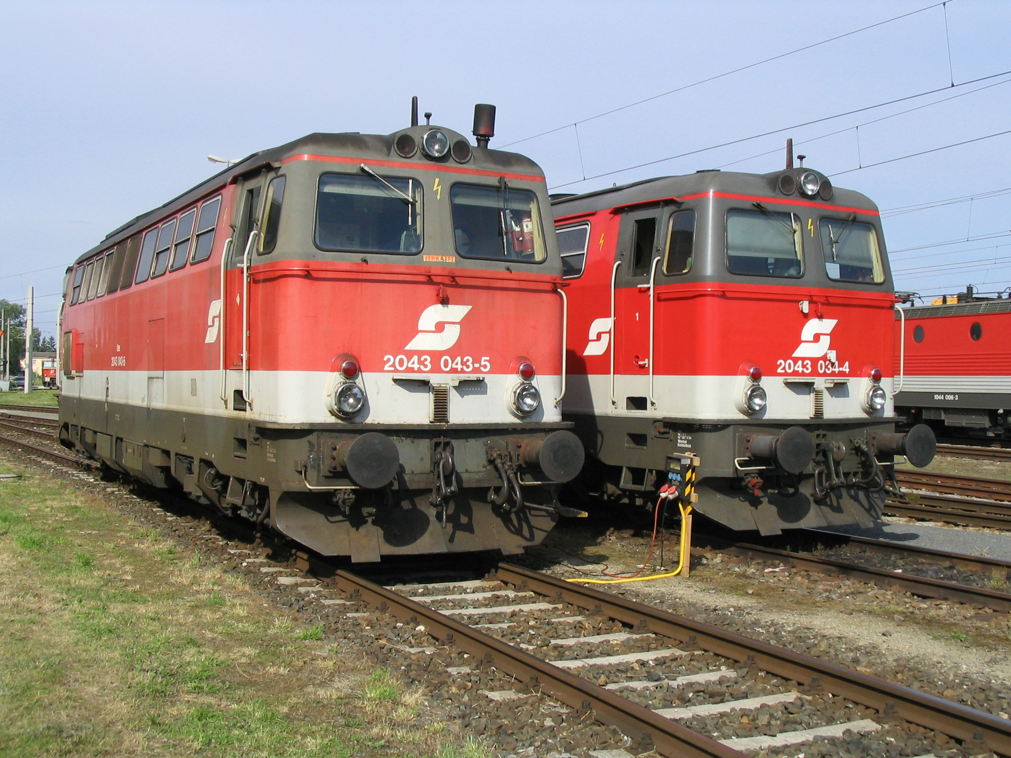 Zwei Lokomotiven der Reihe 2043 im Juni 2004 in Wels.